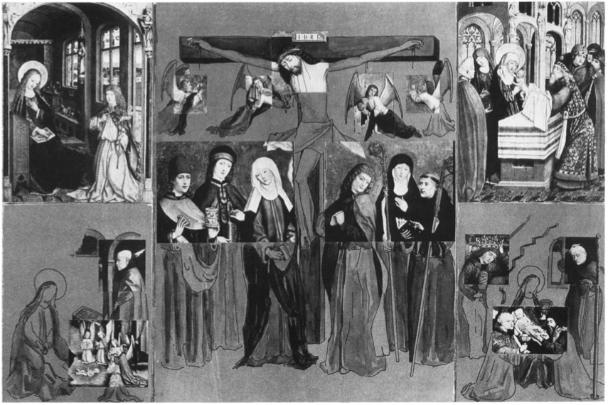 Proposition de reconstruction du retable de Liesborn